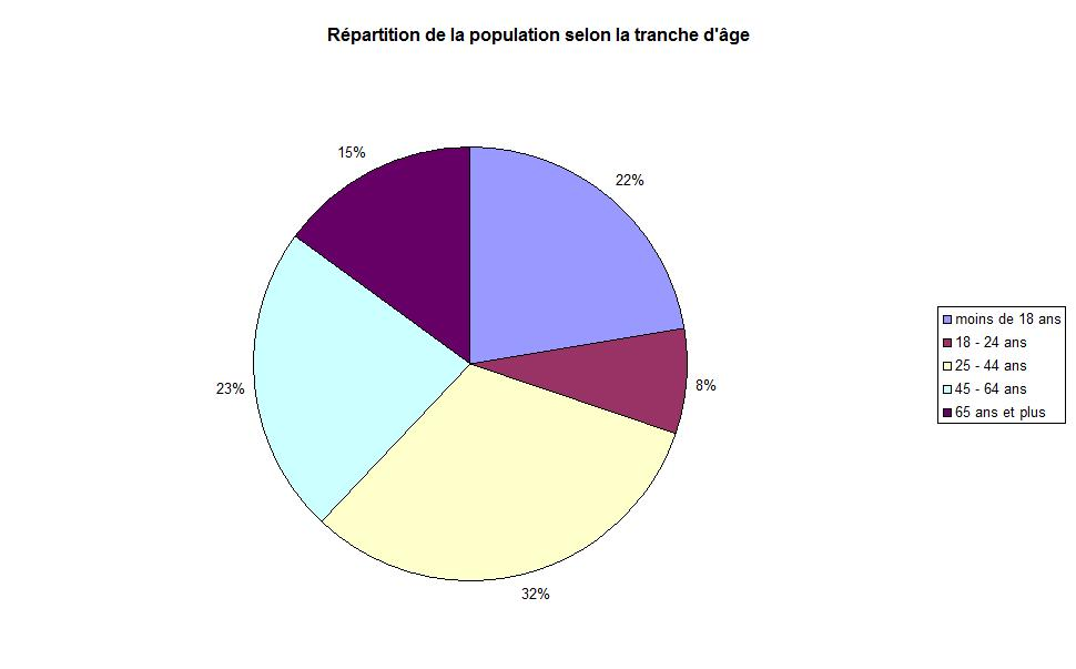 Répartition de la population de Dudley (Géorgie, Etats-Unis) selon la classe d'âge